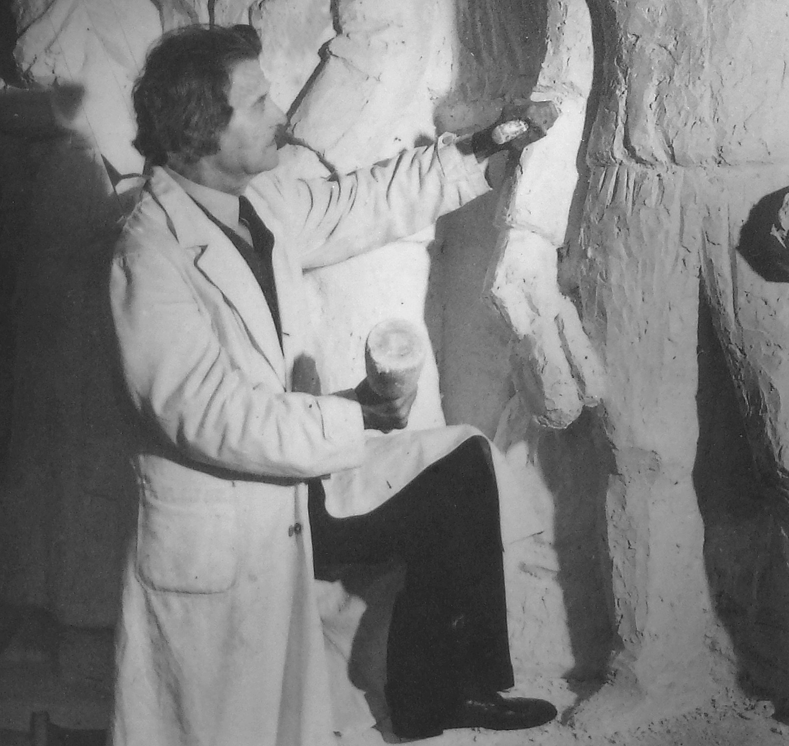 Carl Eldh arbetar med Brantingmonumentet 1942